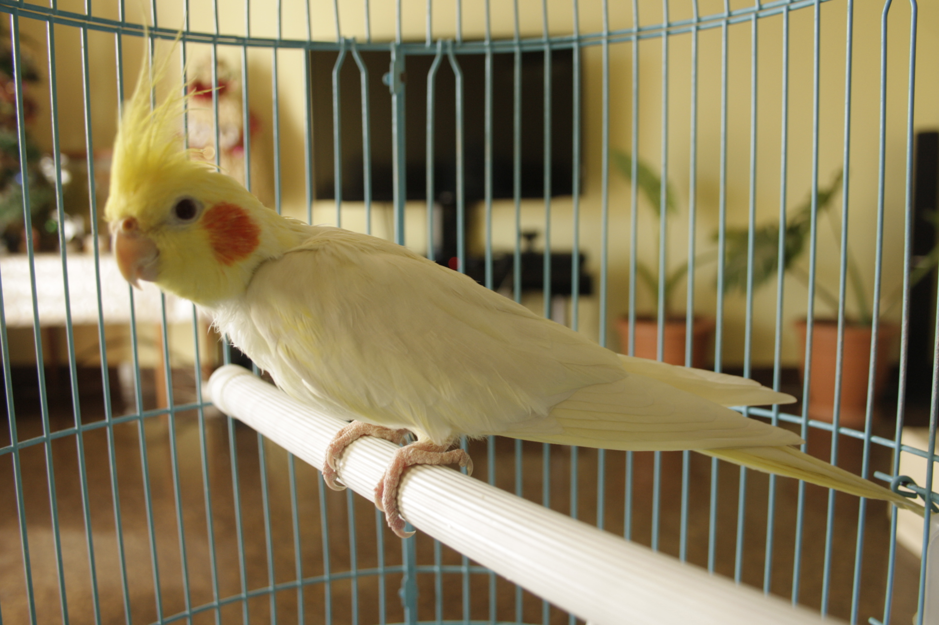 კორელა - ავსტრალიური თუთიყუში